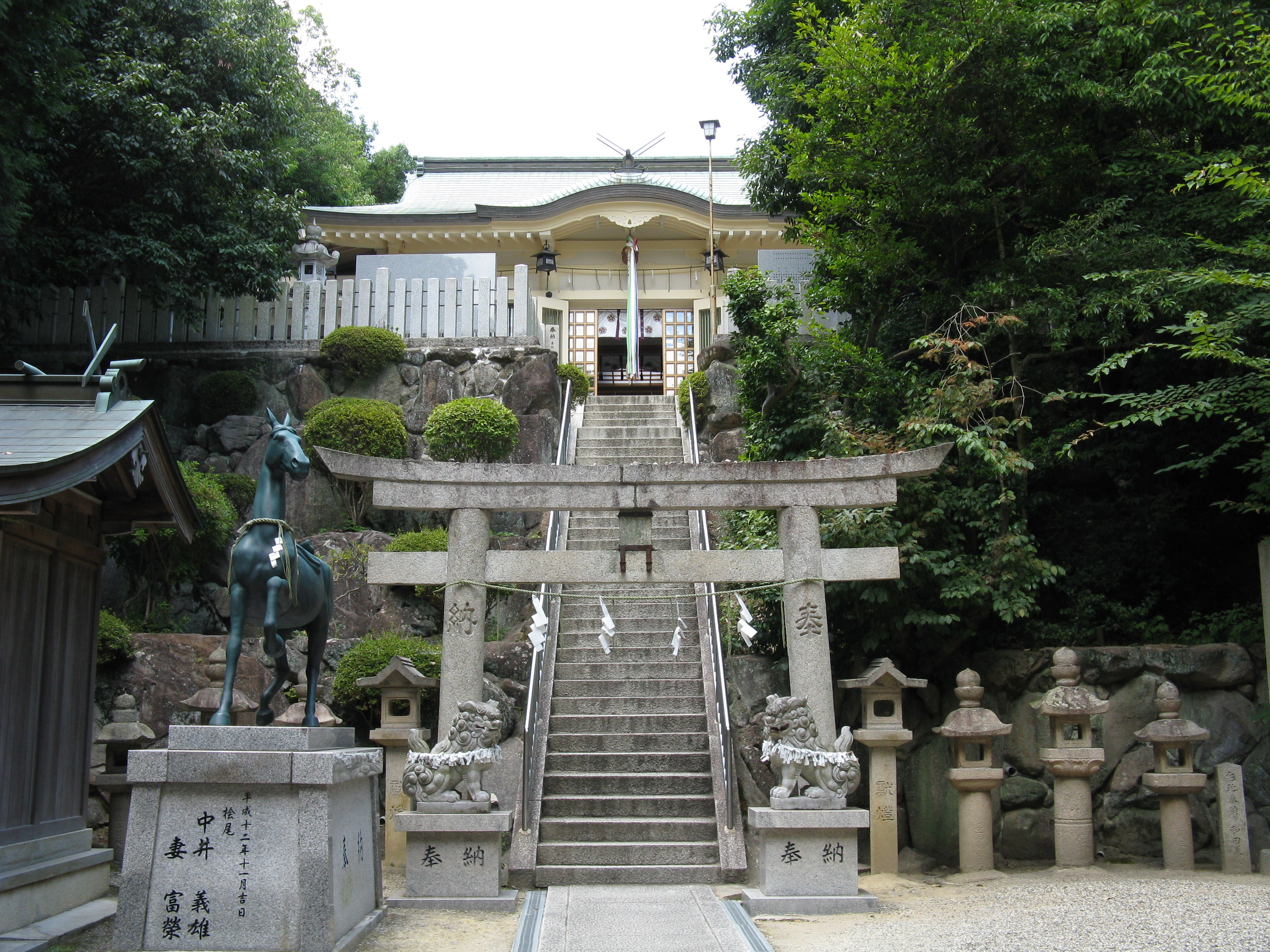 美多彌神社